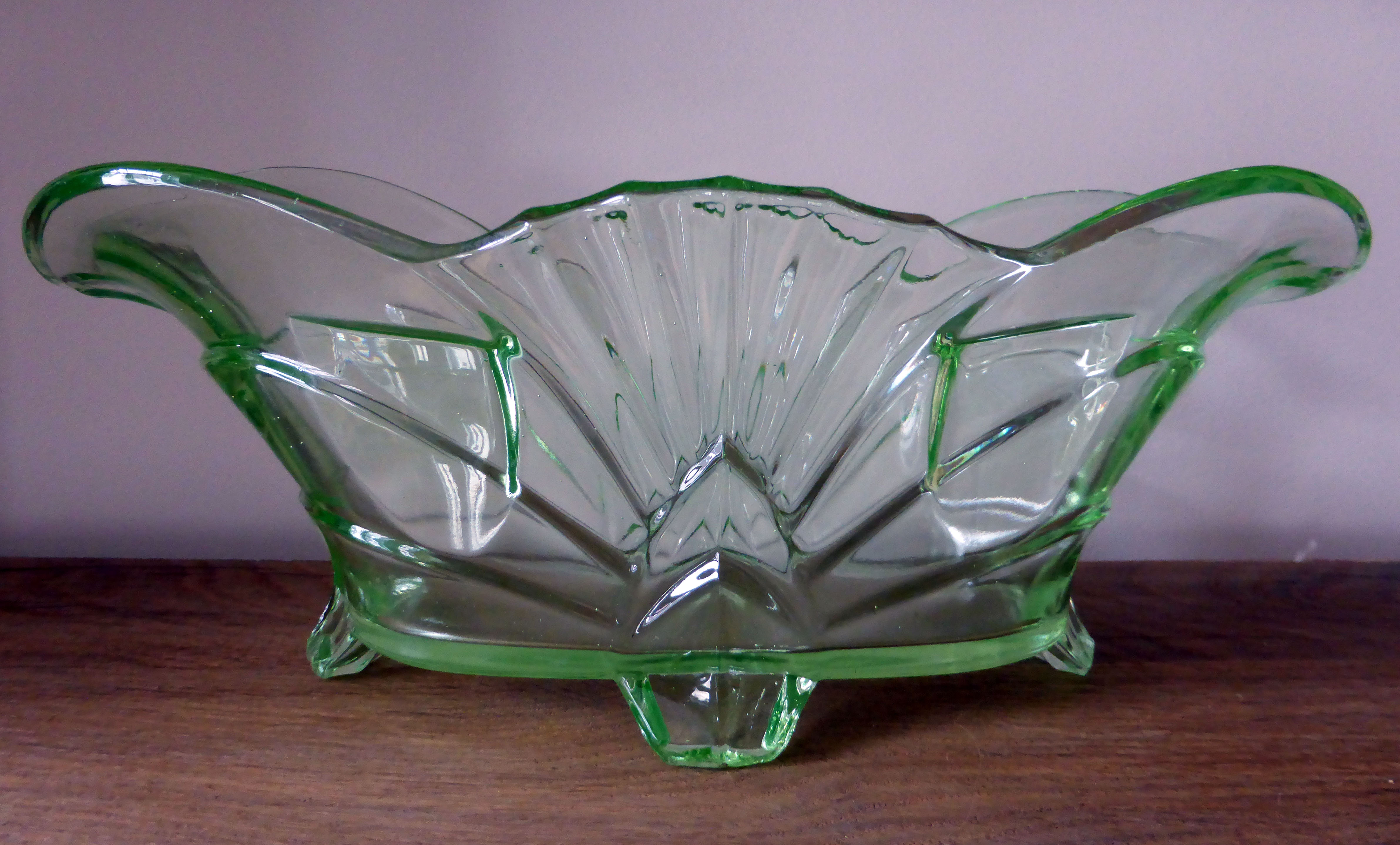 Uranglas-Schale, Art déco (Privatsammlung).